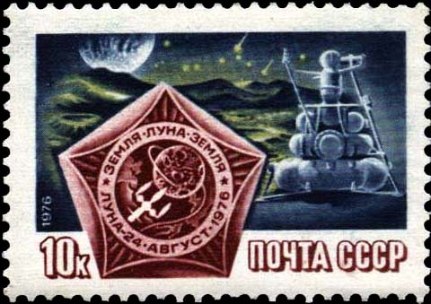 Почтовая марка СССР 1976 года. Станция «Луна-24» на поверхности Луны и Государственный знак станции. Номер по каталогу ЦФА — 4661.